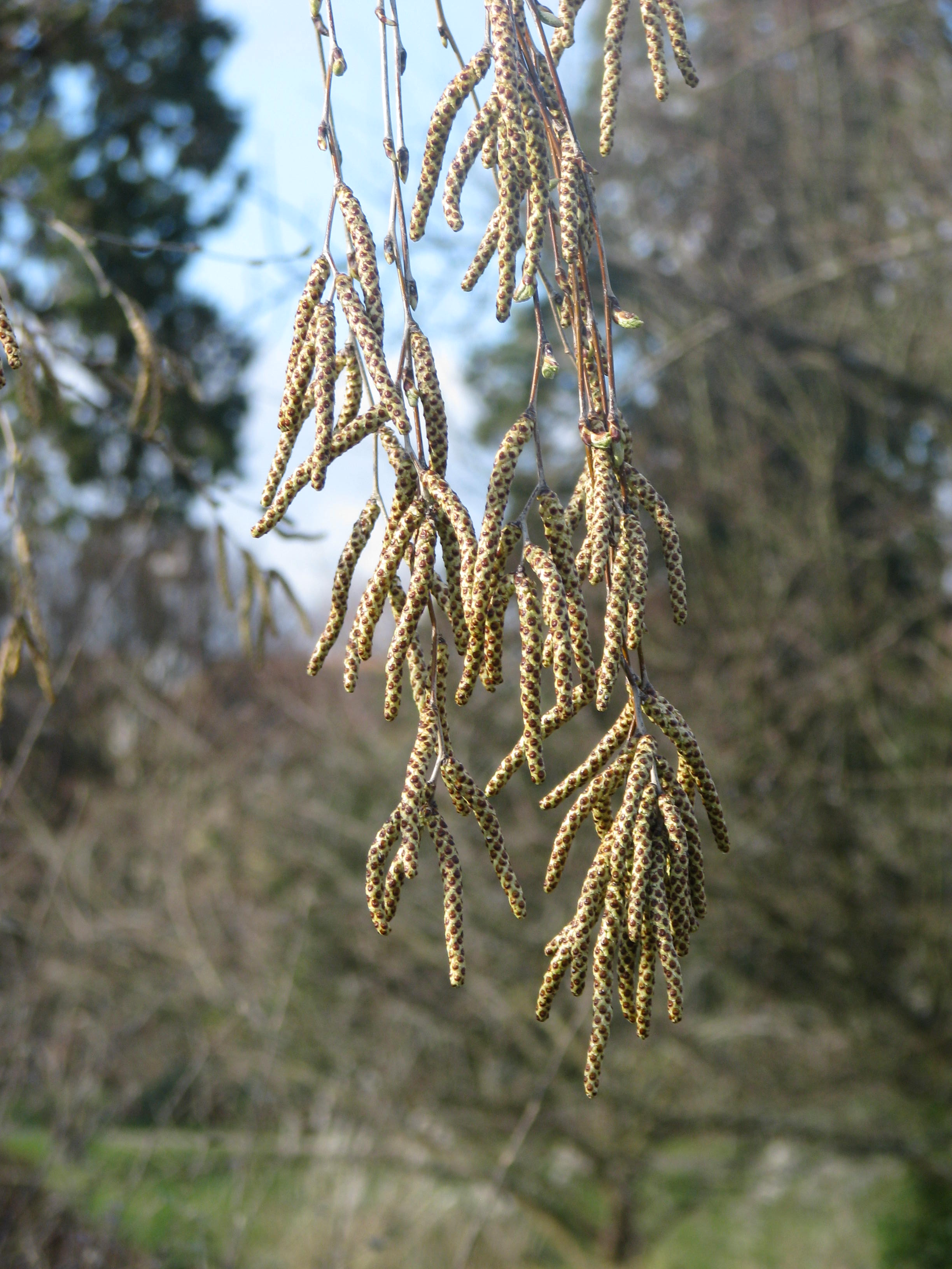 Betula fargesii